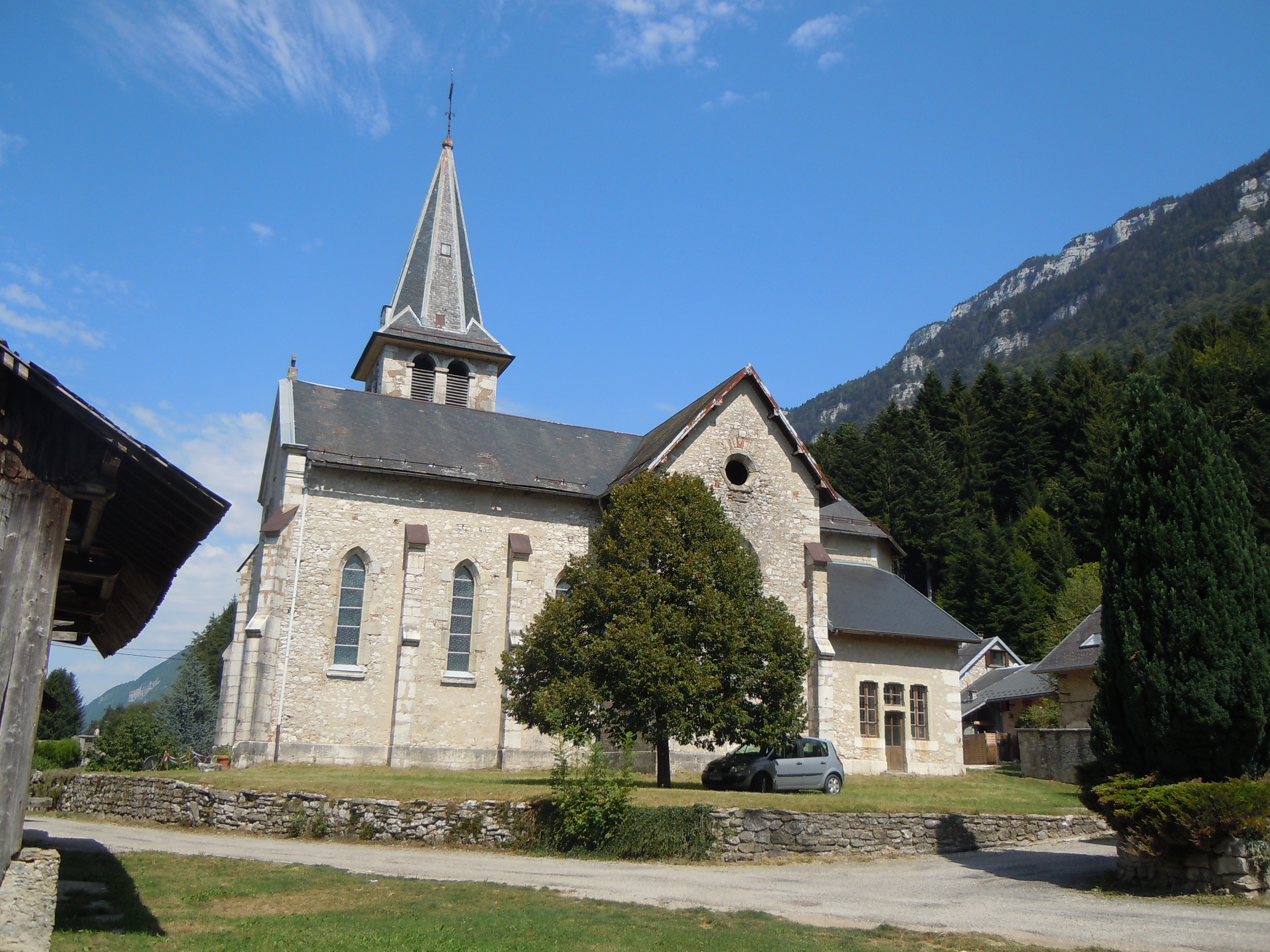 Saint jean de-Couz - église - Savoie - france